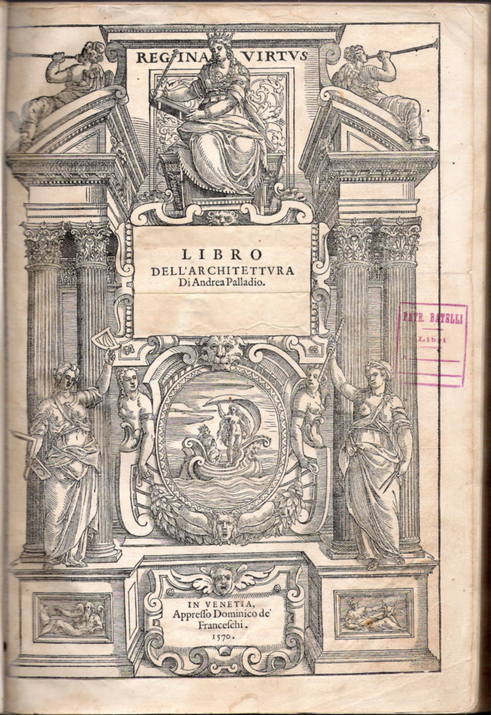 Andrea Palladio, Quattro libri dell’architettura, first edition 1570 - title page